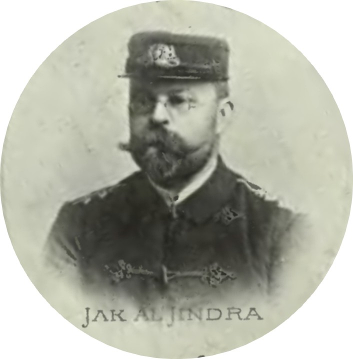 Portrét – Jakub Alois Jindra (1853 - 1908), Český buditel dobrovolného hasičstva.